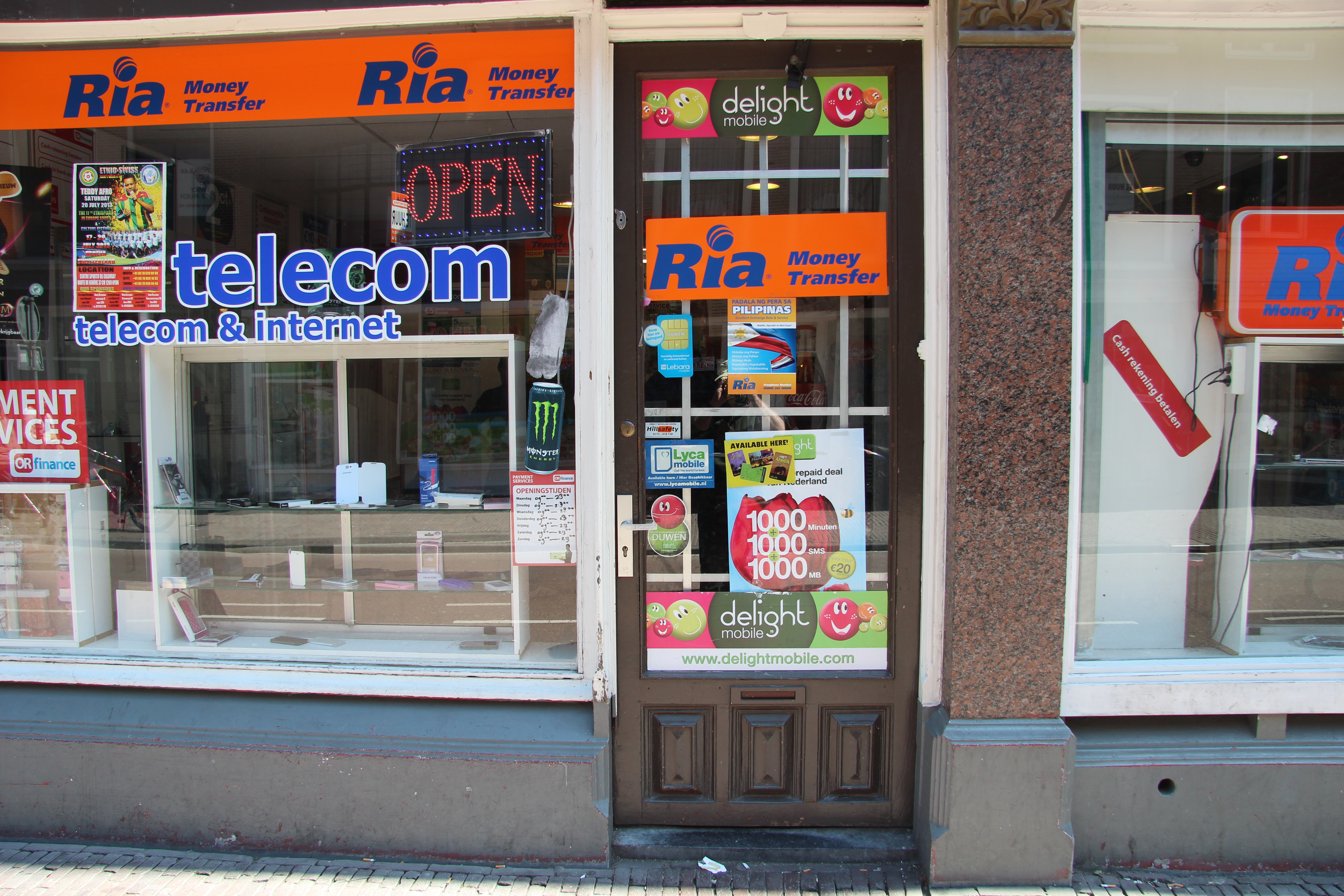 Ria money transfer. Vestiging in Leiden.